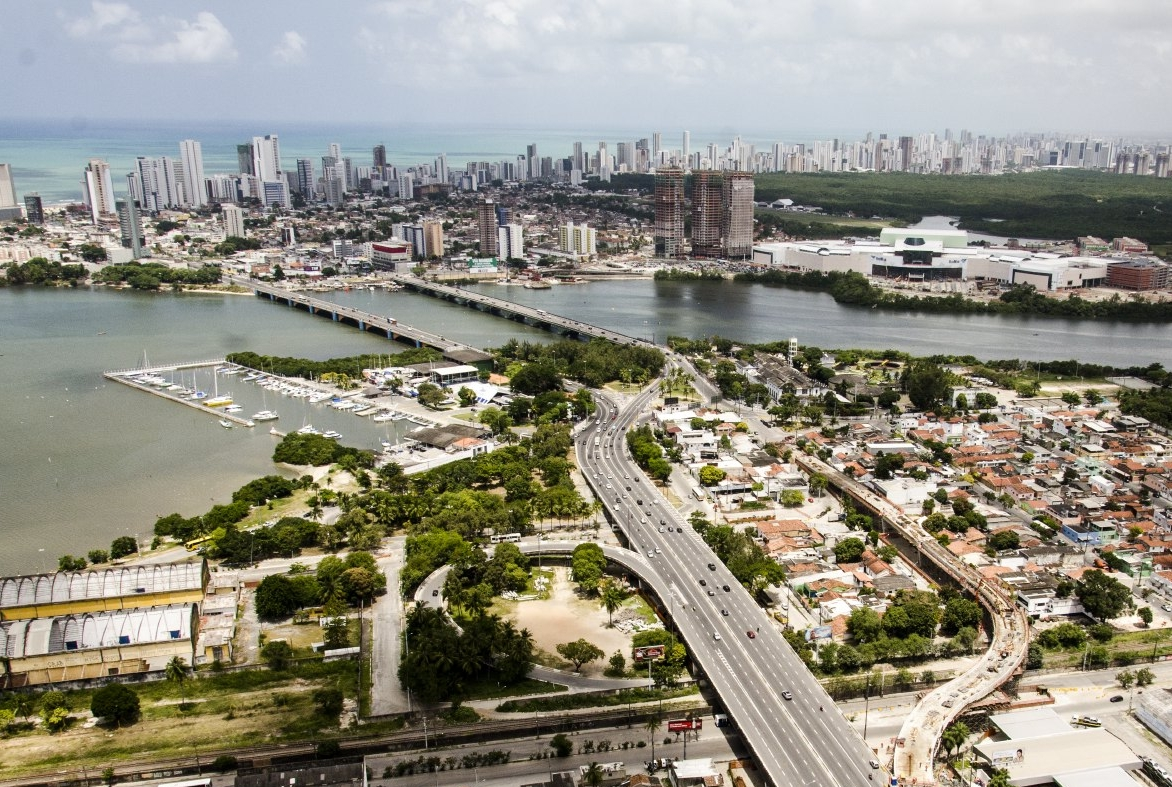 Bairro do Pina ao fundo - Recife, Pernambuco, Brasil.